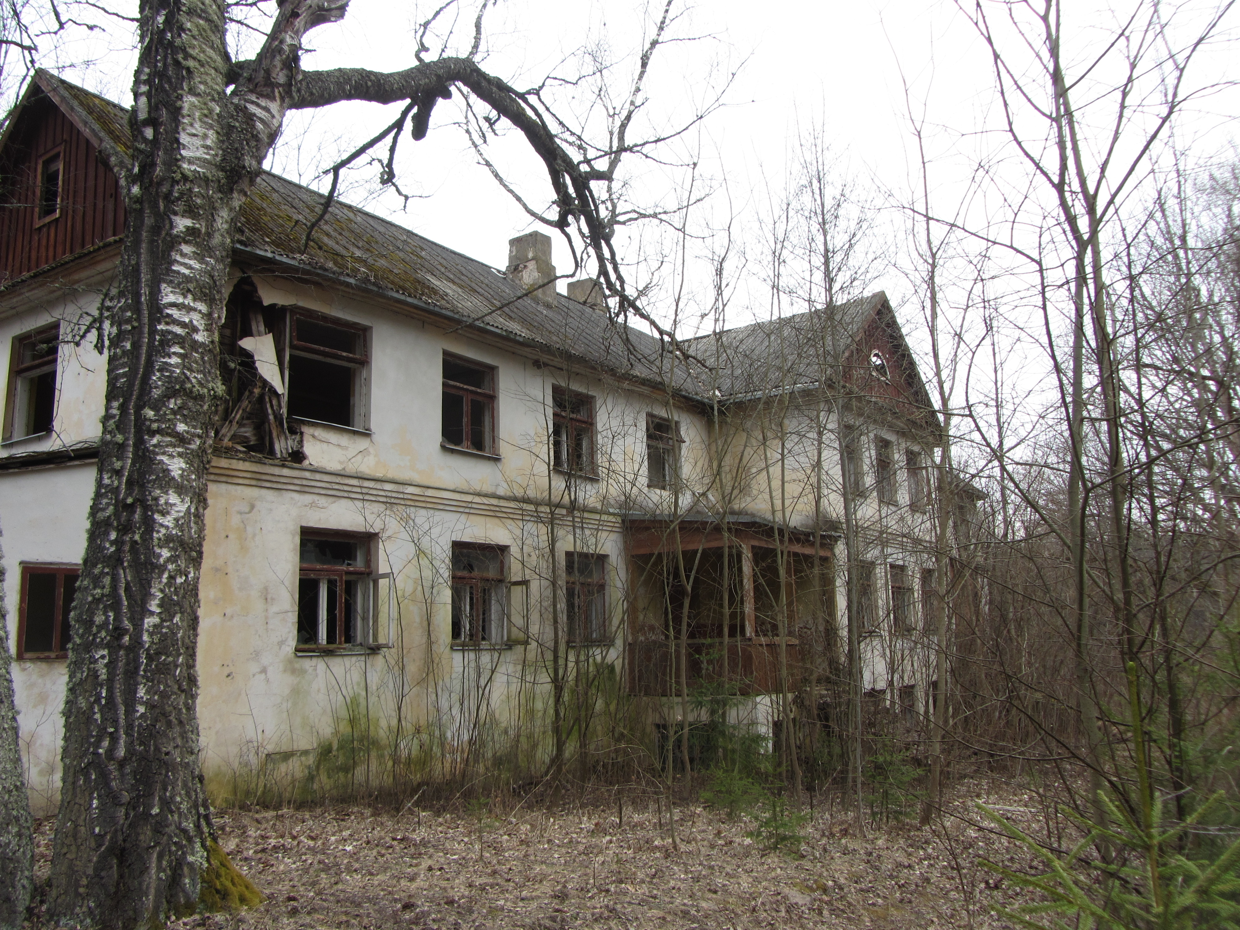 Stelmužė 32295, Lithuania